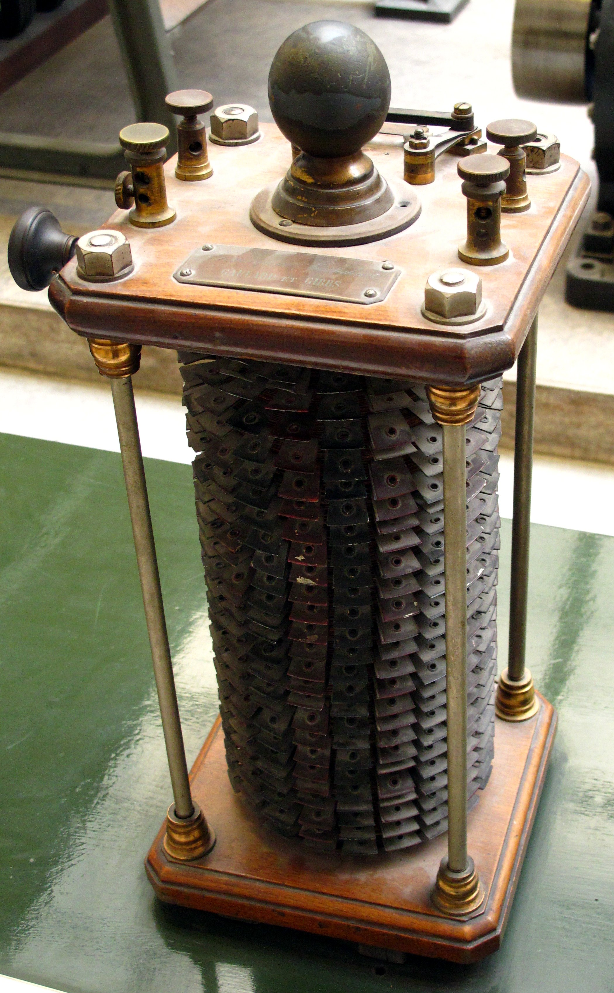 Frühe Verteilnetz-Transformatoren von Gaulard und Gibbs. Mehrere dieser Transformatoren wurden 1884 auf der Turiner Elektrizitätsaustellung vorgeführt um von einer Wasserkraftanlage in Lanzo eine Leistung von 20 kW mit einer Spannung von 2000 V über 40 km nach Turin zu übertragen. Hersteller: Gaulard und Gibbs, 1882